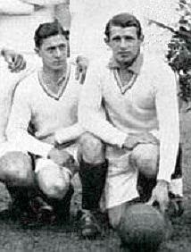 France à la Coupe du monde de football de 1930 : Lucien Laurent et Marcel Langiller